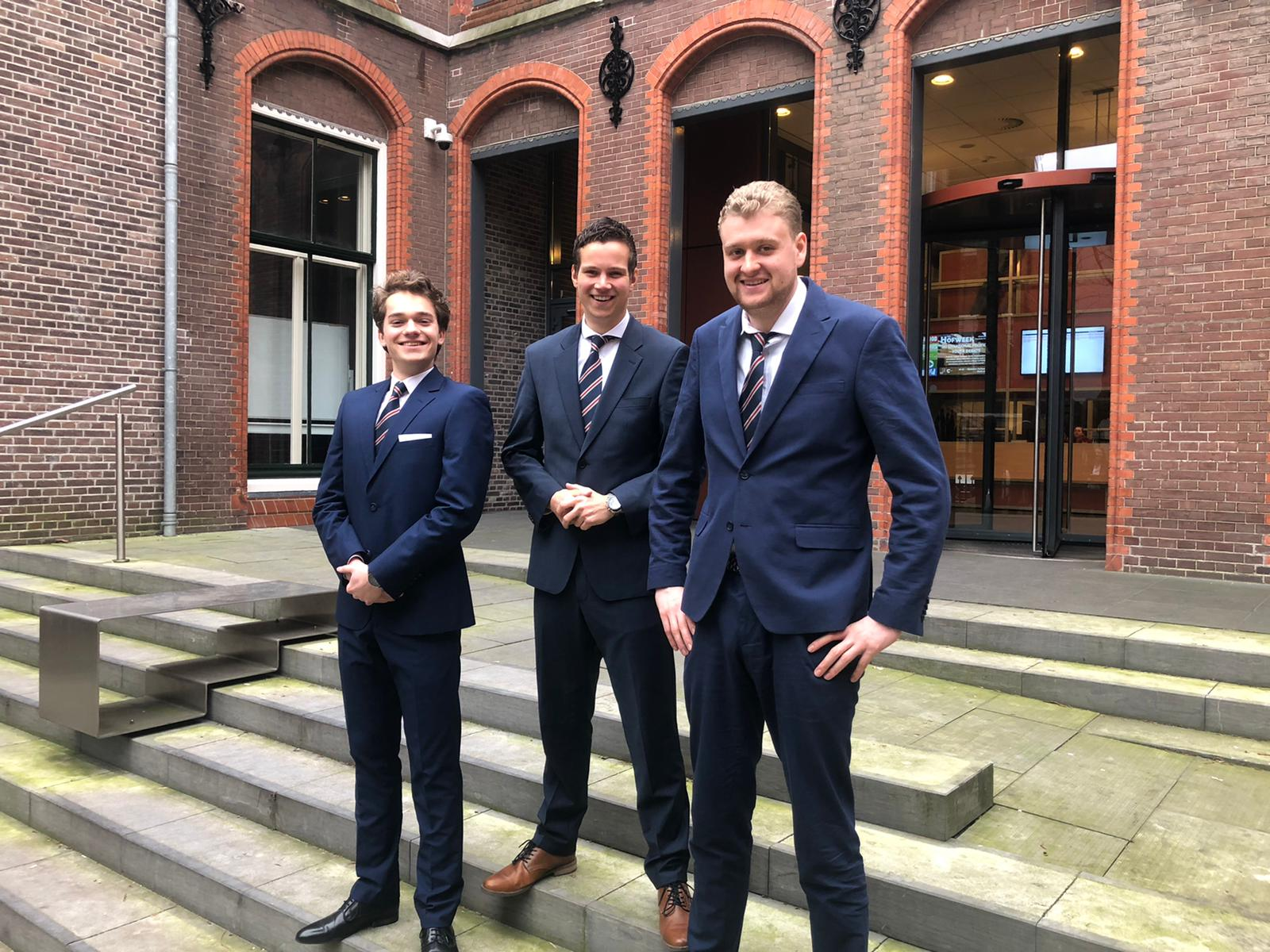 V.l.n.r: Sverre E.H. Kelderman (secretaris), Willem-Jan Verdoes (voorzitter) & Rein Sloof (penningmeester)